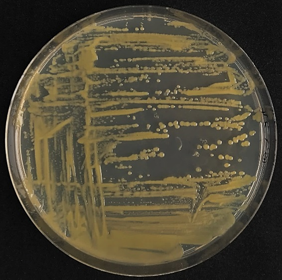 Colonies de Xanthomonas campestris pv. vitians sur milieu TSA 1/10eme